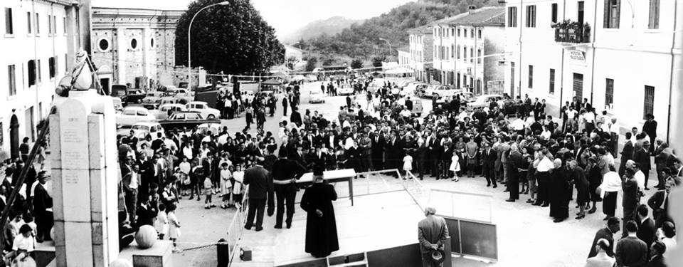 Festa dell ciliegie a Marano di Valpolicella (provincia di Verona), in una fotografia del 23 giugno 1963